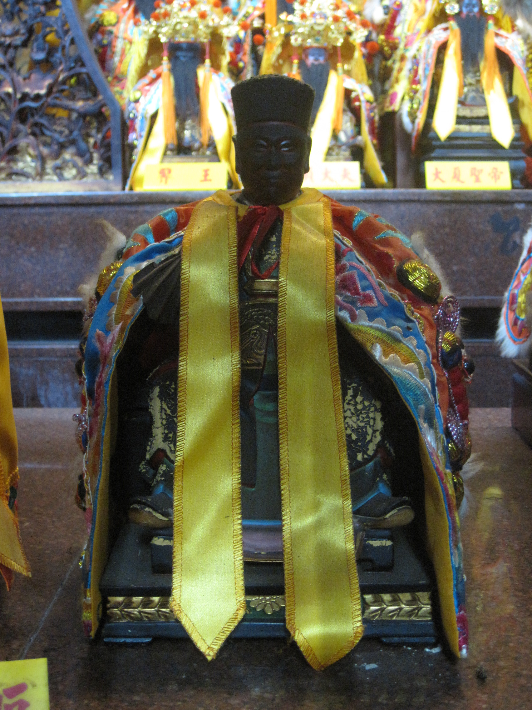 鹽行禹帝宮蔣元樞像